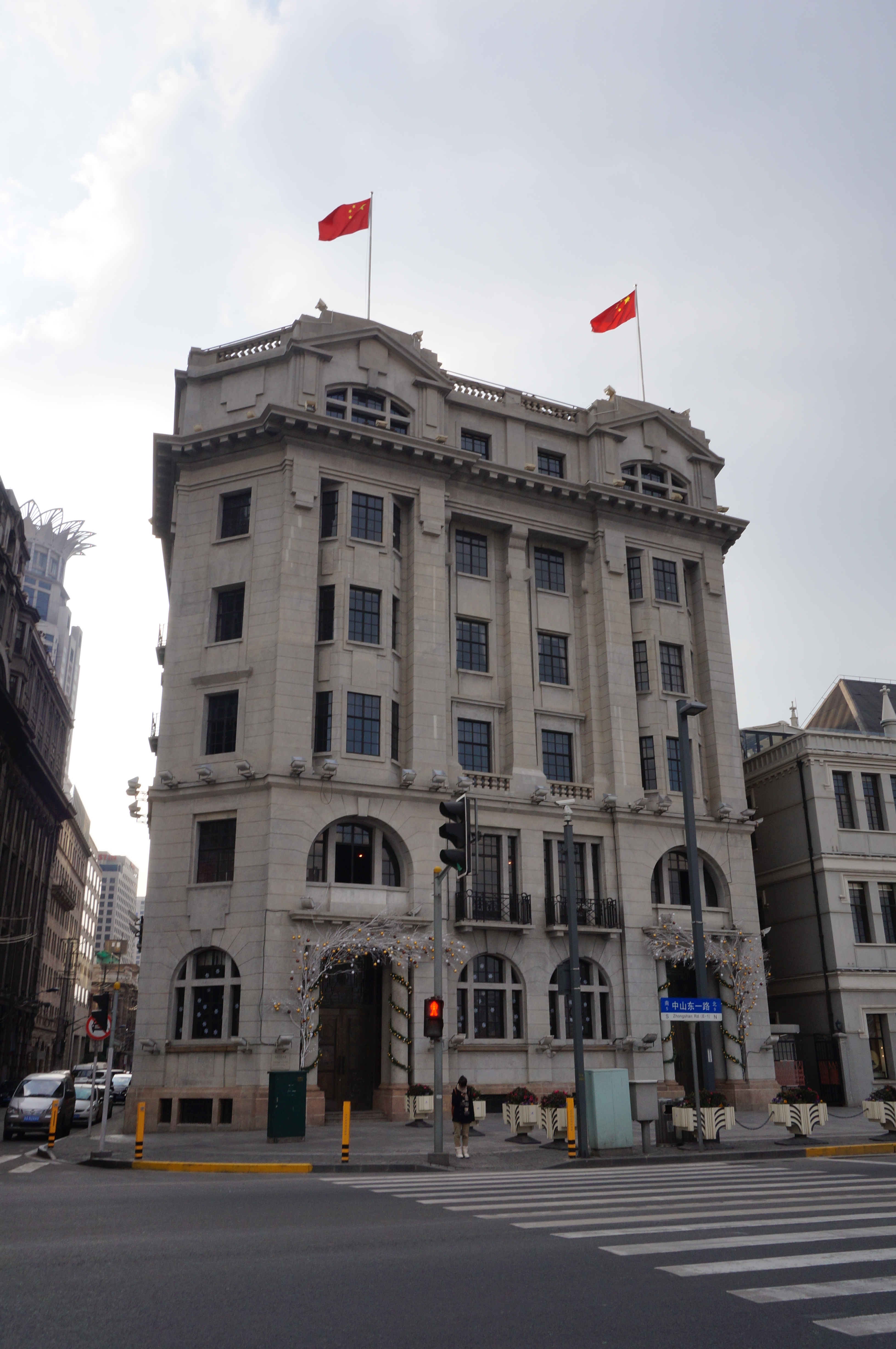 外滩日清大楼